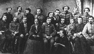 В. Дунін-Марцінкевіч з дачкой Камілай у групе інтэлігенцыі горада Мінска.